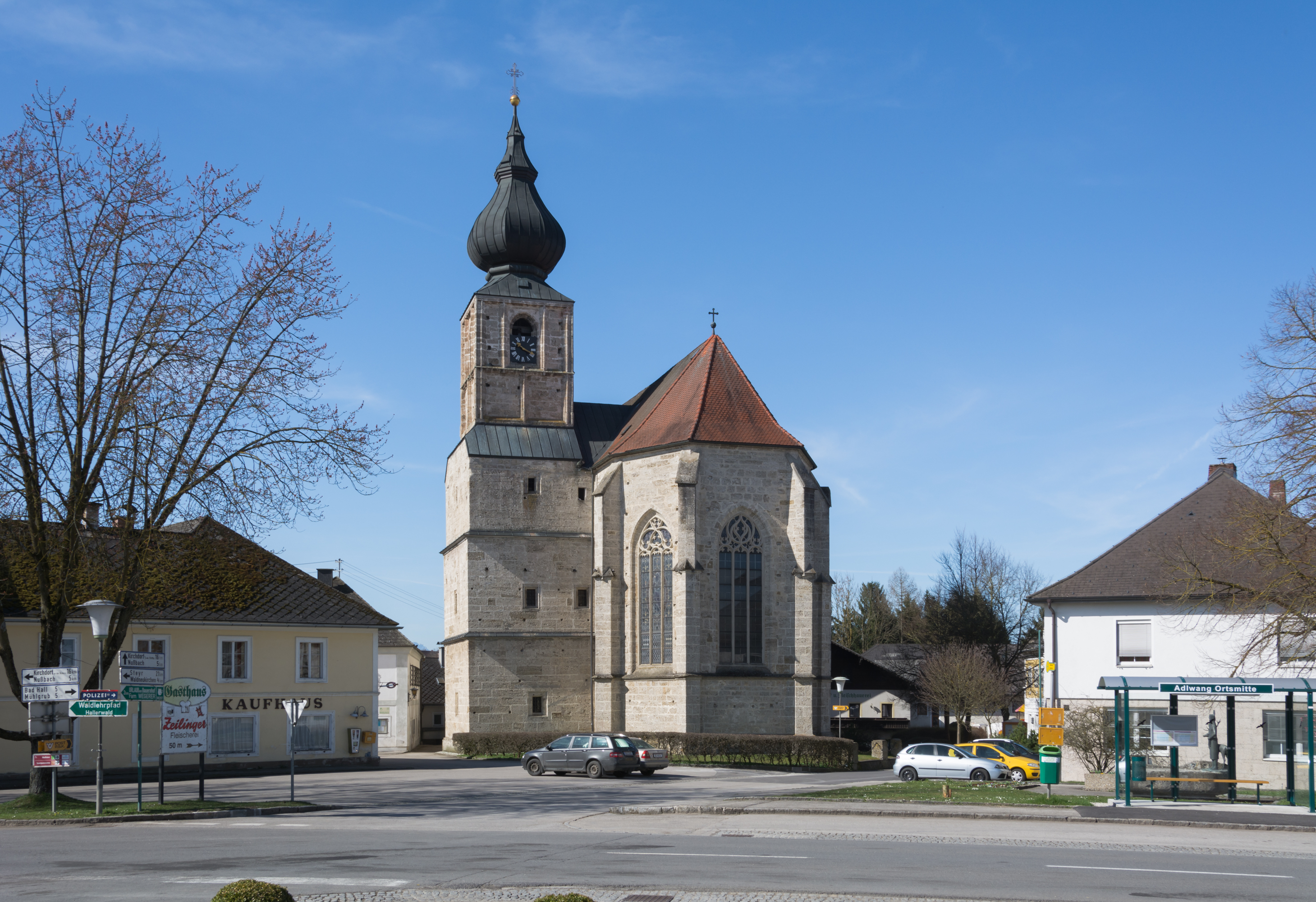 Kath. Pfarrkirche, Wallfahrtskirche Sieben Schmerzen Mariä